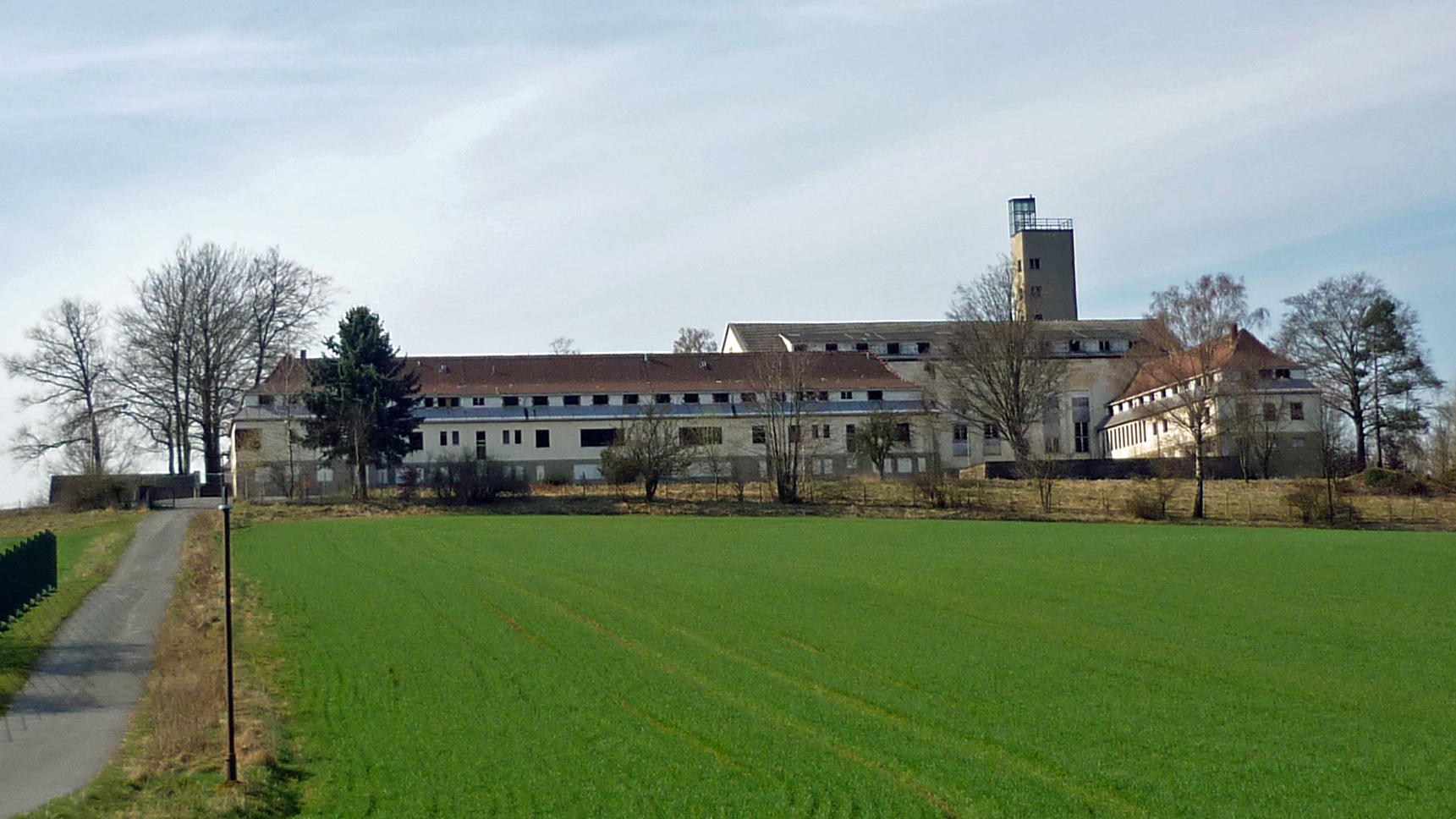 Ehemaliges Jugenderholungsheim auf der Endlerkuppe (367 m) bei Ottendorf / Sebnitz (1929) Architekt: Kurt Bärbig